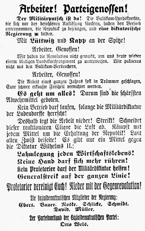 Aufruf vom 13. März 1920 des Reichspräsidenten Ebert, der sozialdemokratischen Mitglieder der Reichsregierung und des Parteivorstandes der SPD an „Arbeiter! Parteigenossen!“ zum Generalstreik gegen den Kapp-Putsch.